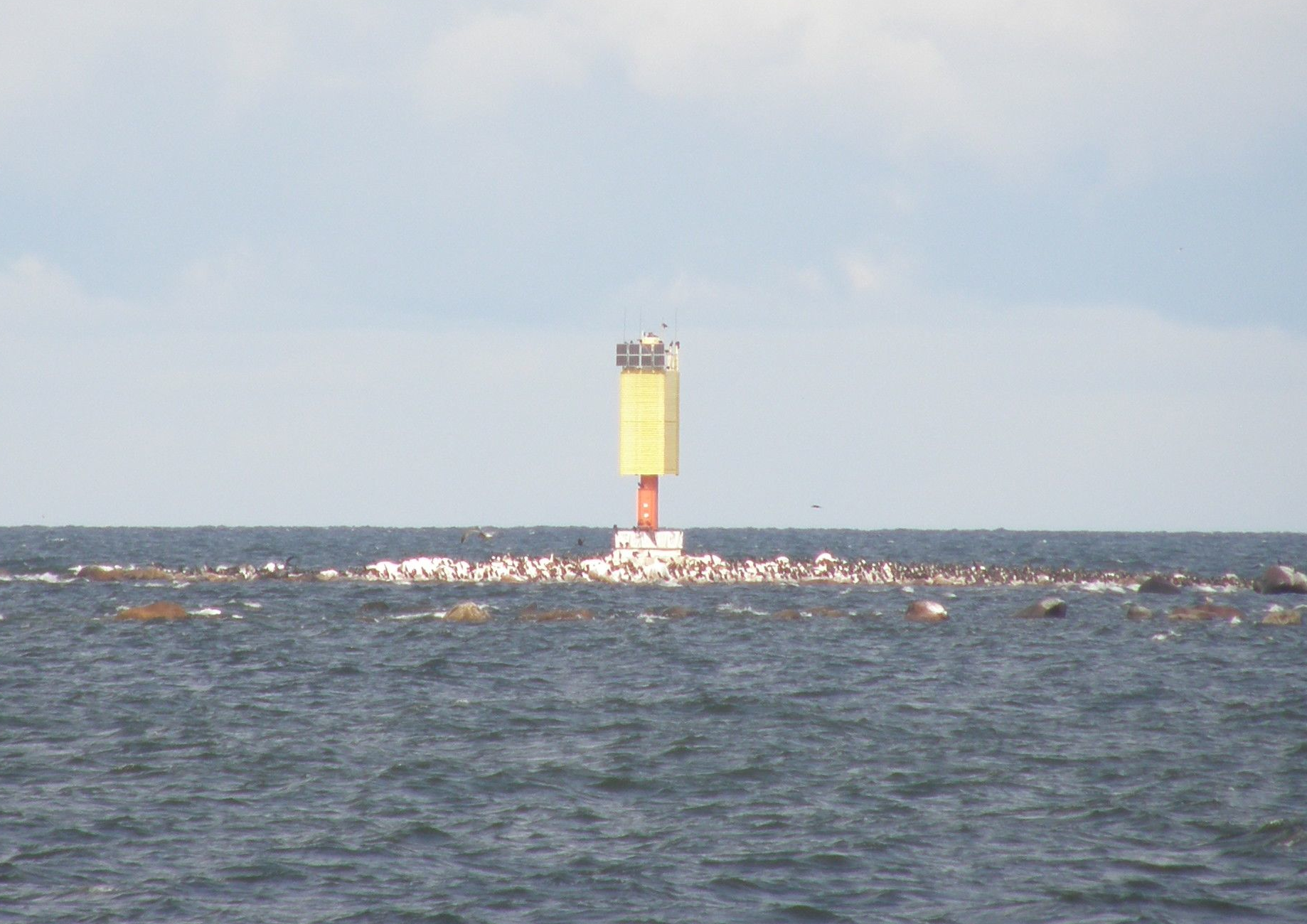 Aegna tulepaak